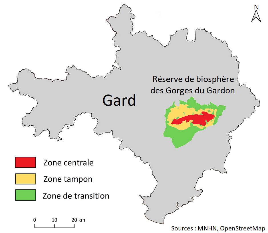 Carte de la surface totale de la réserve de biosphère des Gorges du Gardon